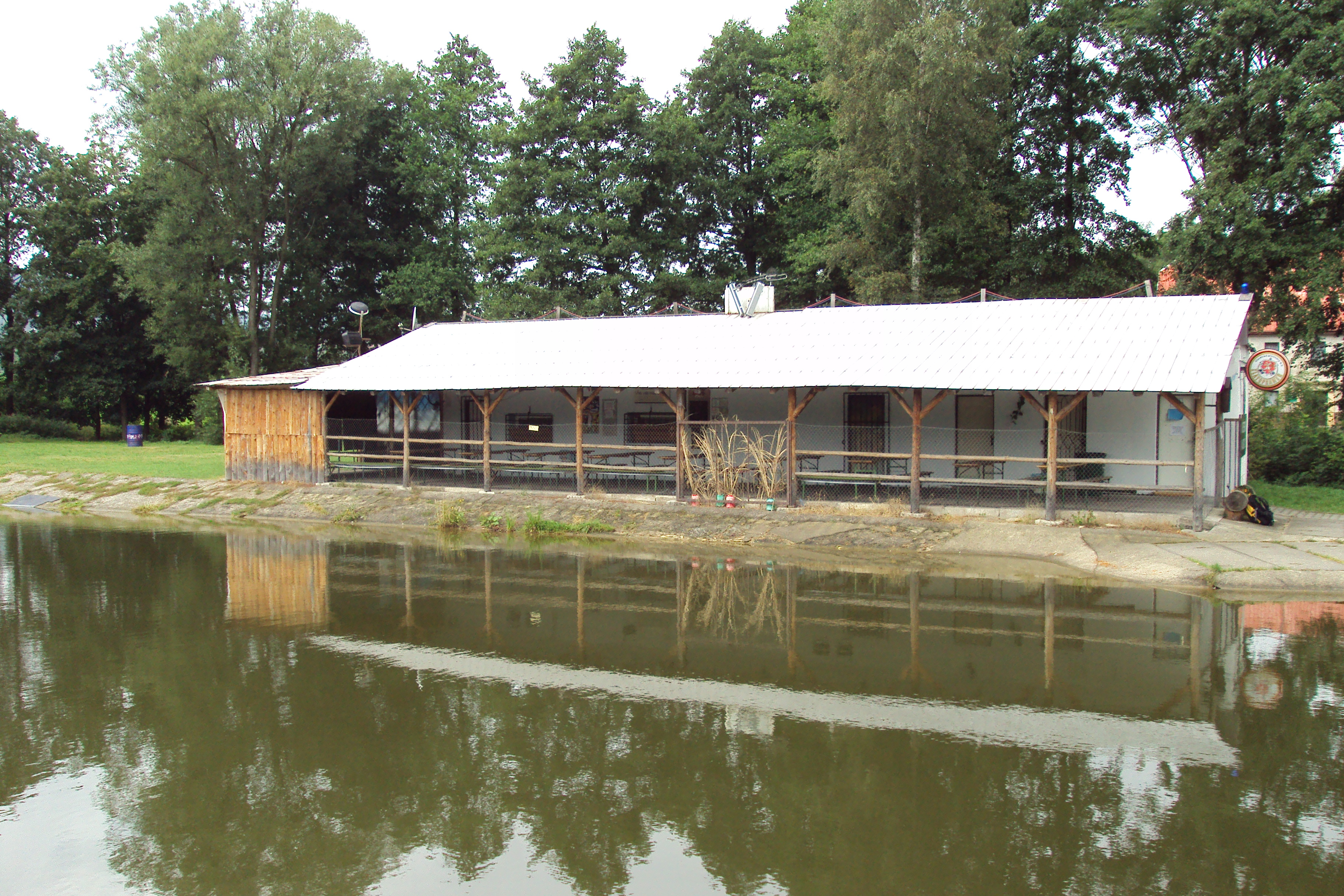 Koupaliště Dolní Podluží, kiosek